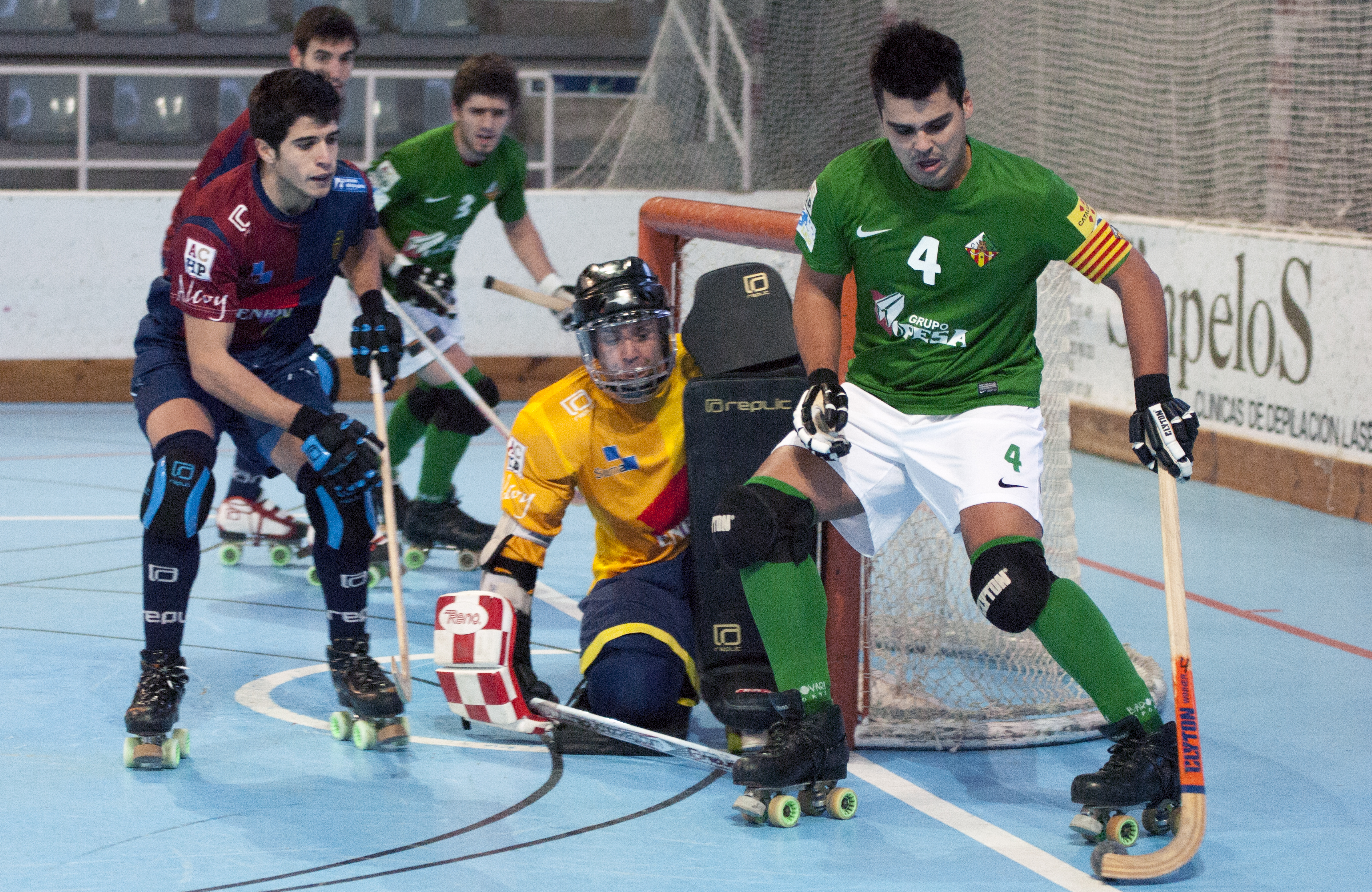 Partit entre l'Enrile PAS Alcoi i el CP Vilanova.